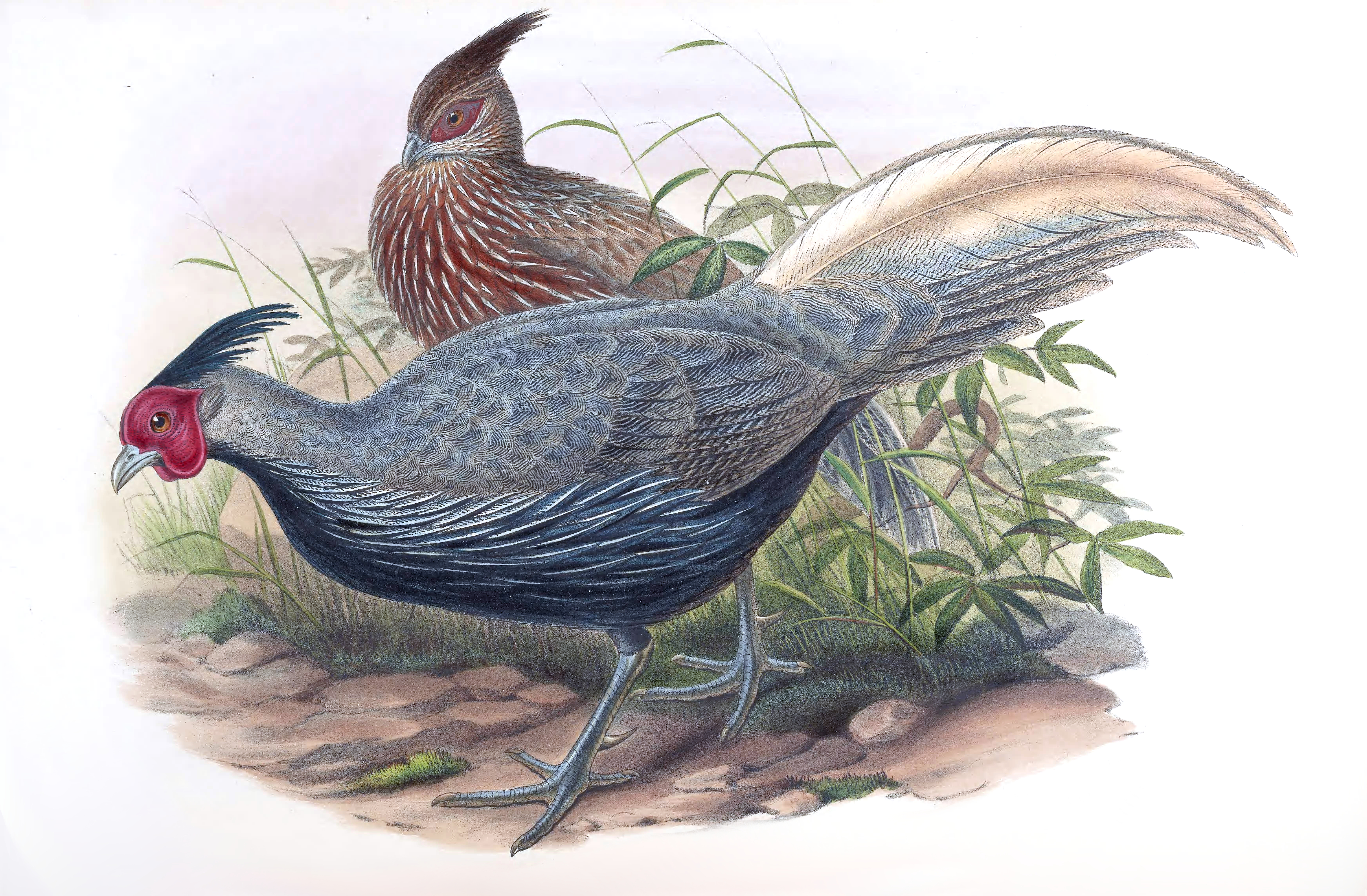 Kaleej Pheasant, Lophura leucomelanos